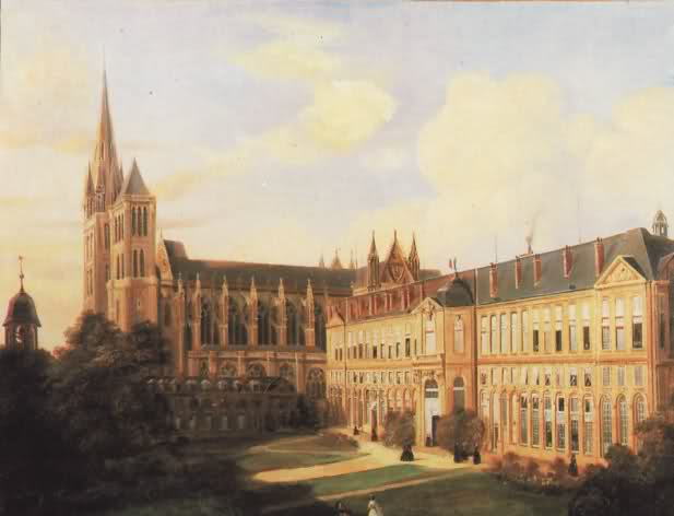 Vue du Sud-Ouest sur les deux tours et la flèche de la Basilique Saint-Denis ainsi que sur la Maison d’Éducation de la Légion d'Honneur. Peinture anonyme du XIXe siècle, Musée de la Légion d'Honneur.